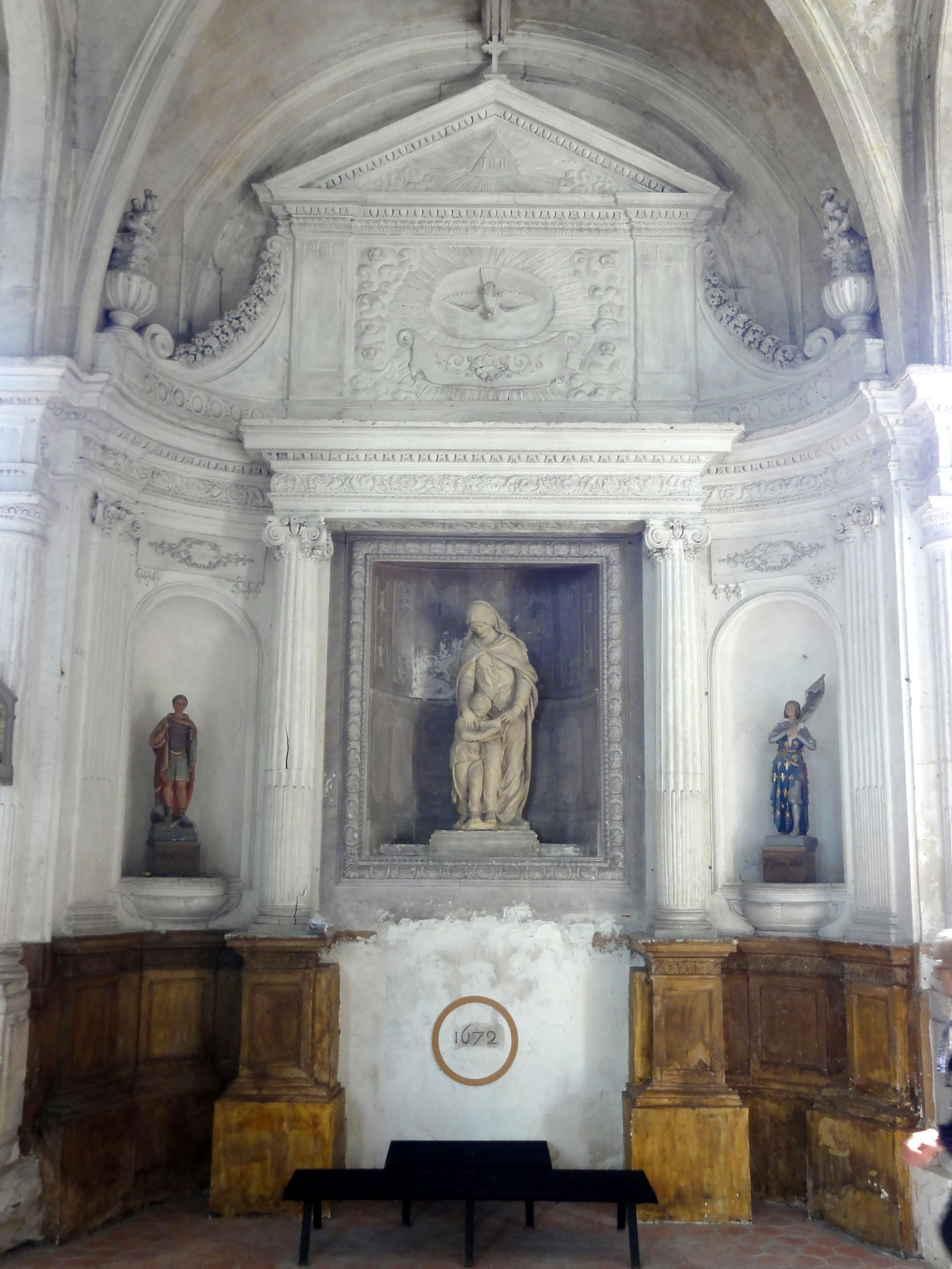 Bas-côté sud, 2e chapelle, autel de Sainte Anne, 1672.